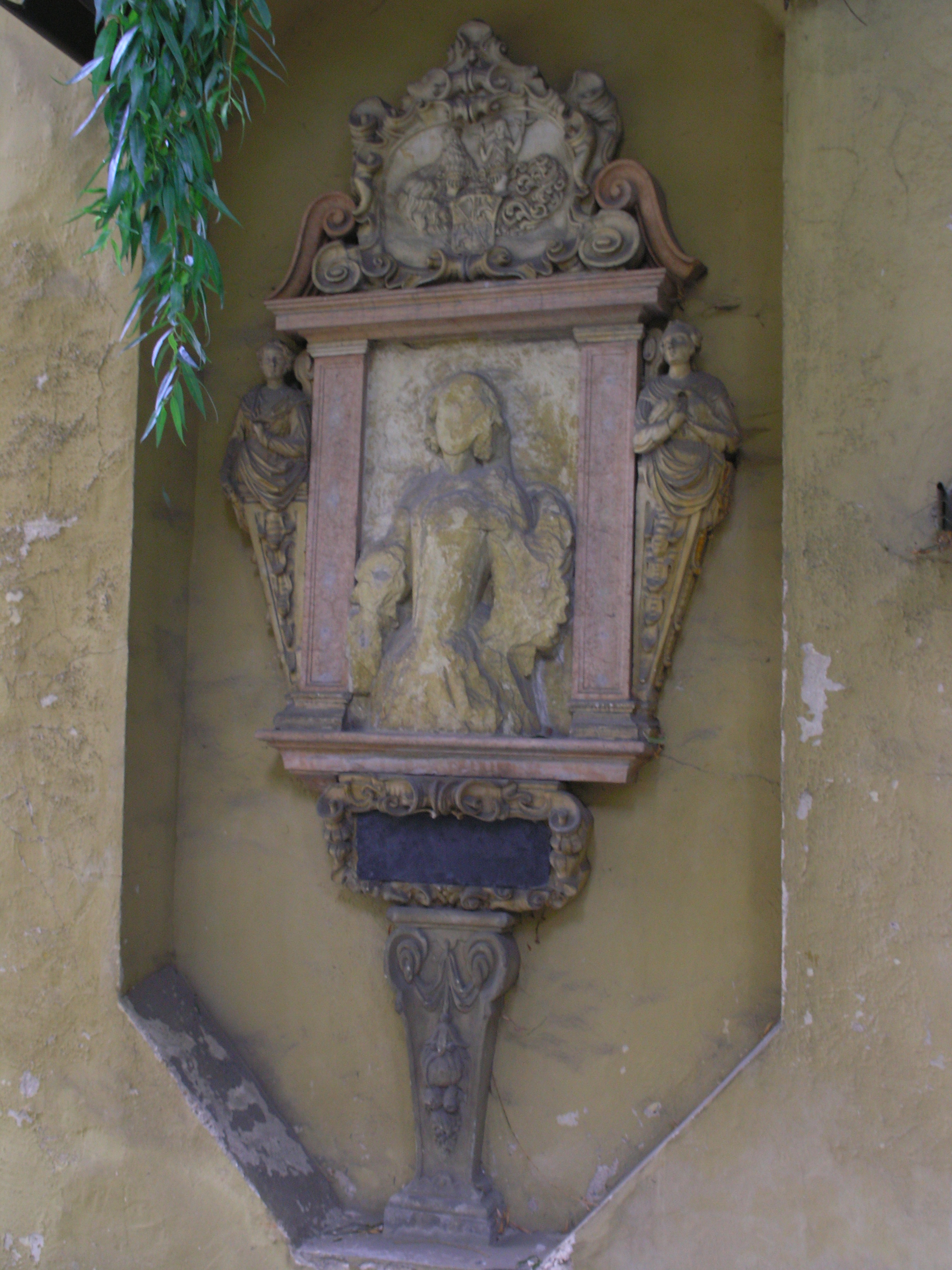 Epitaph der Ehefrau Maria Elisabeth (+ 19. April 1664) des Gesandten für Sachsen-Altenburg Johannes Thomas